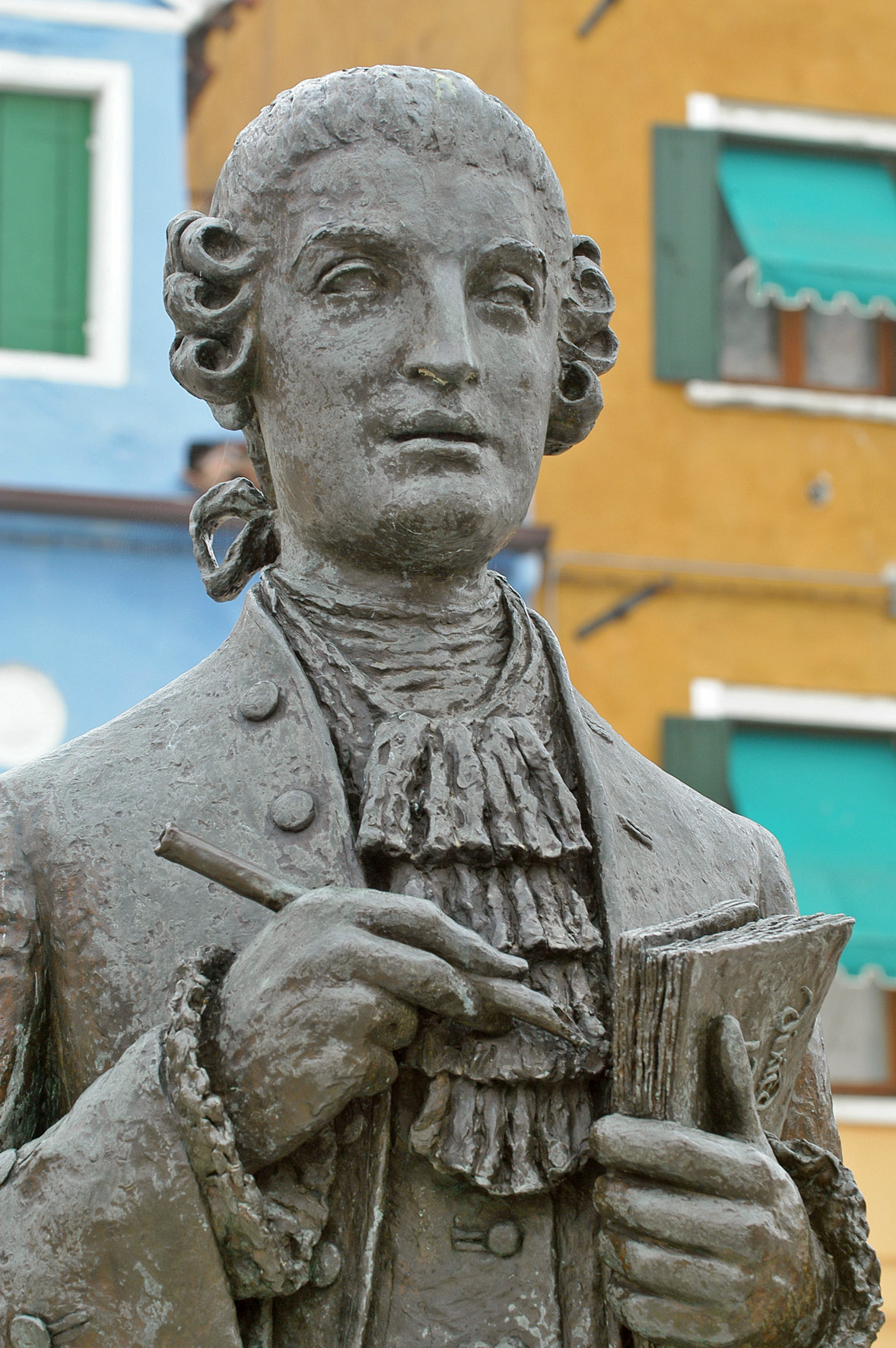 Sujet:Baldassare Galuppi-Statu zu Burano